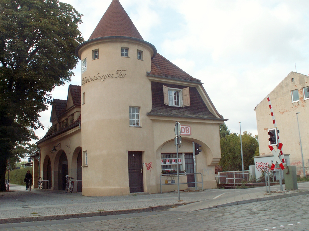 Aufgenommen auf einem Stadtrundgang durch Neuruppin.